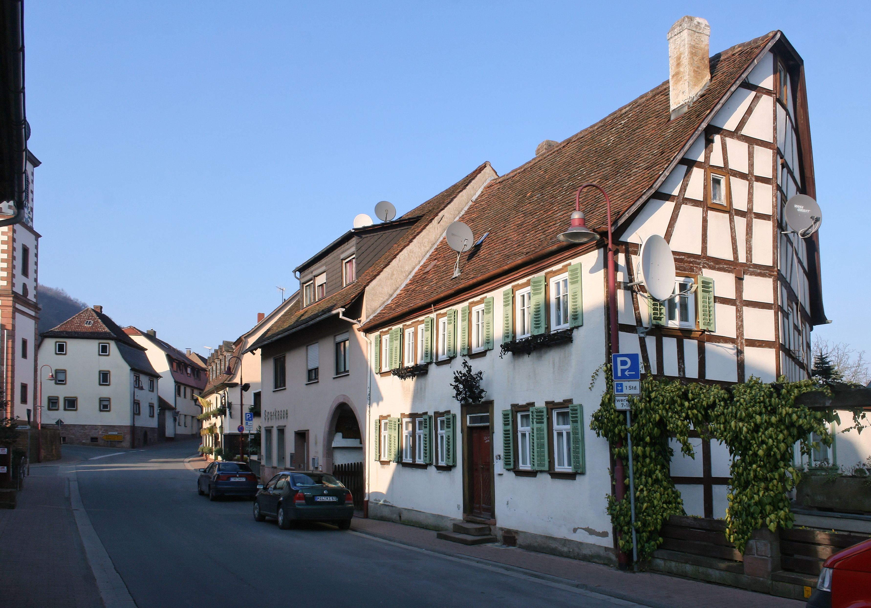 Die Miltenberger Straße ist die Ortsdurchfahrt von Laudenbach (Bayern).